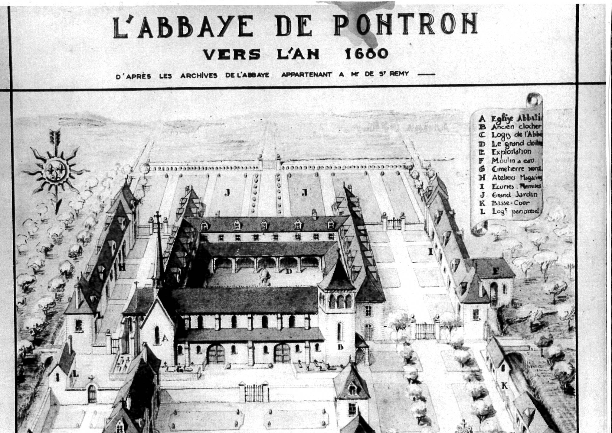 Abbaye de Pontron - Le Louroux-Béconnais